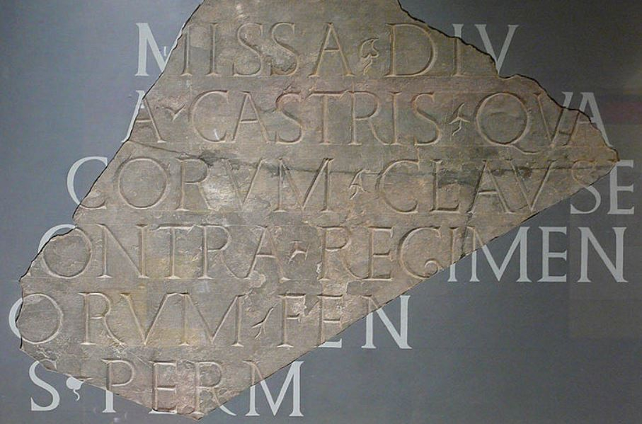 Inscription latine issue du site archéologique de l'ancienne forteresse romaine Deva Victrix